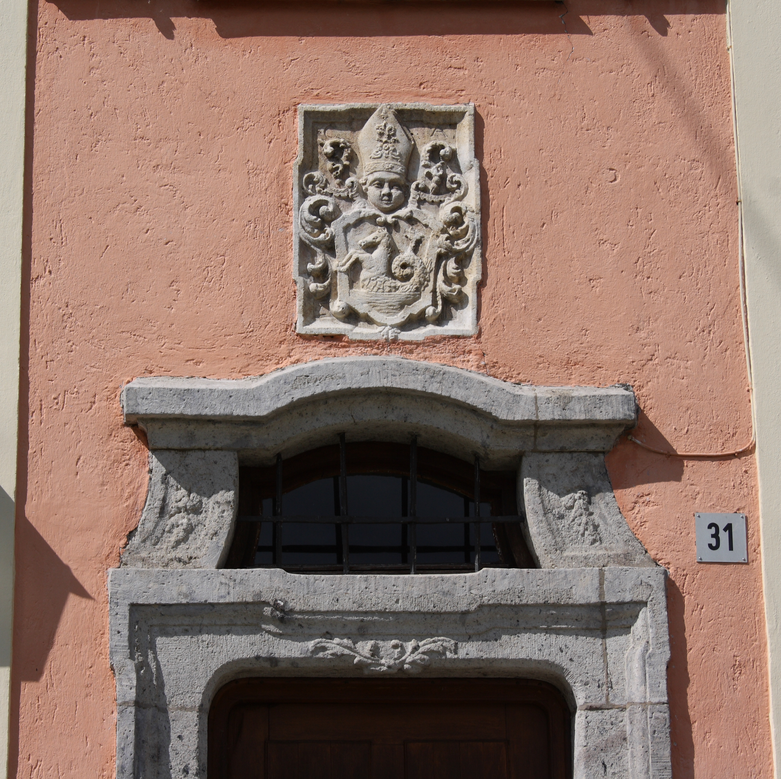 katholisches Pfarrhaus in Wörnitzstein, erbaut 1741 wohl von Johann Georg Hitzelberger, Wappen des Abts Cölestin I. Meermoos von Kloster Kaisheim, Graf-Hartmann-Straße 31